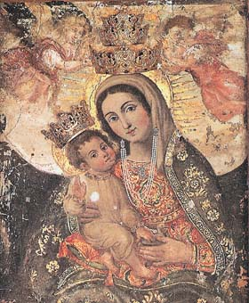 La Sacra immagine impressa nel pilastro della Madonna di Valverde (provincia di Catania). Tradizionalmente si dice che la bellissima immagine sia divinitus formata ovvero non attribuibile a pennello d’uomo.